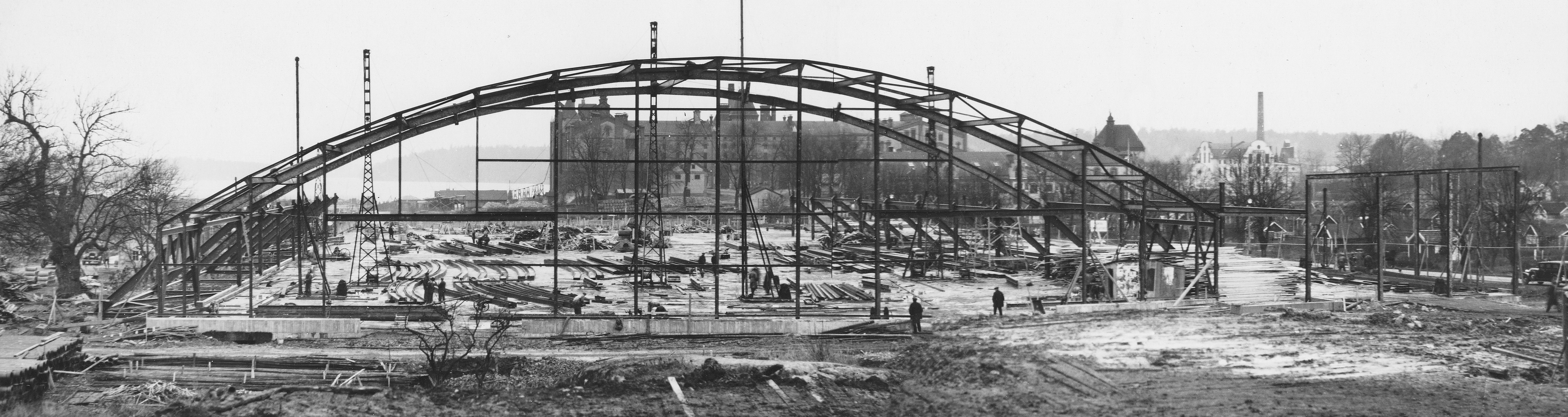 Hornsbergs garage, bygget, montage av stålbalkarna